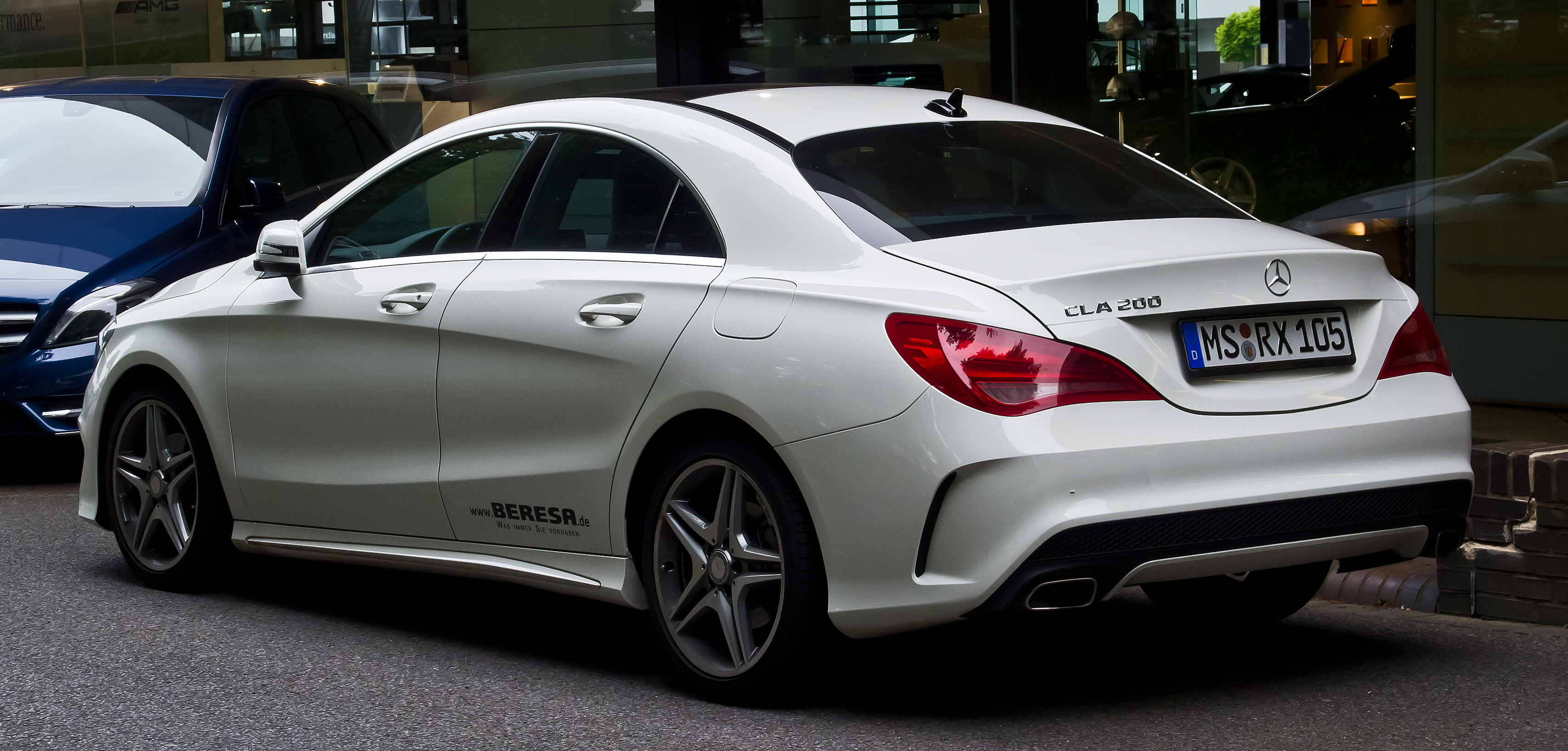 Mercedes-Benz CLA 200 AMG Line (C 117)